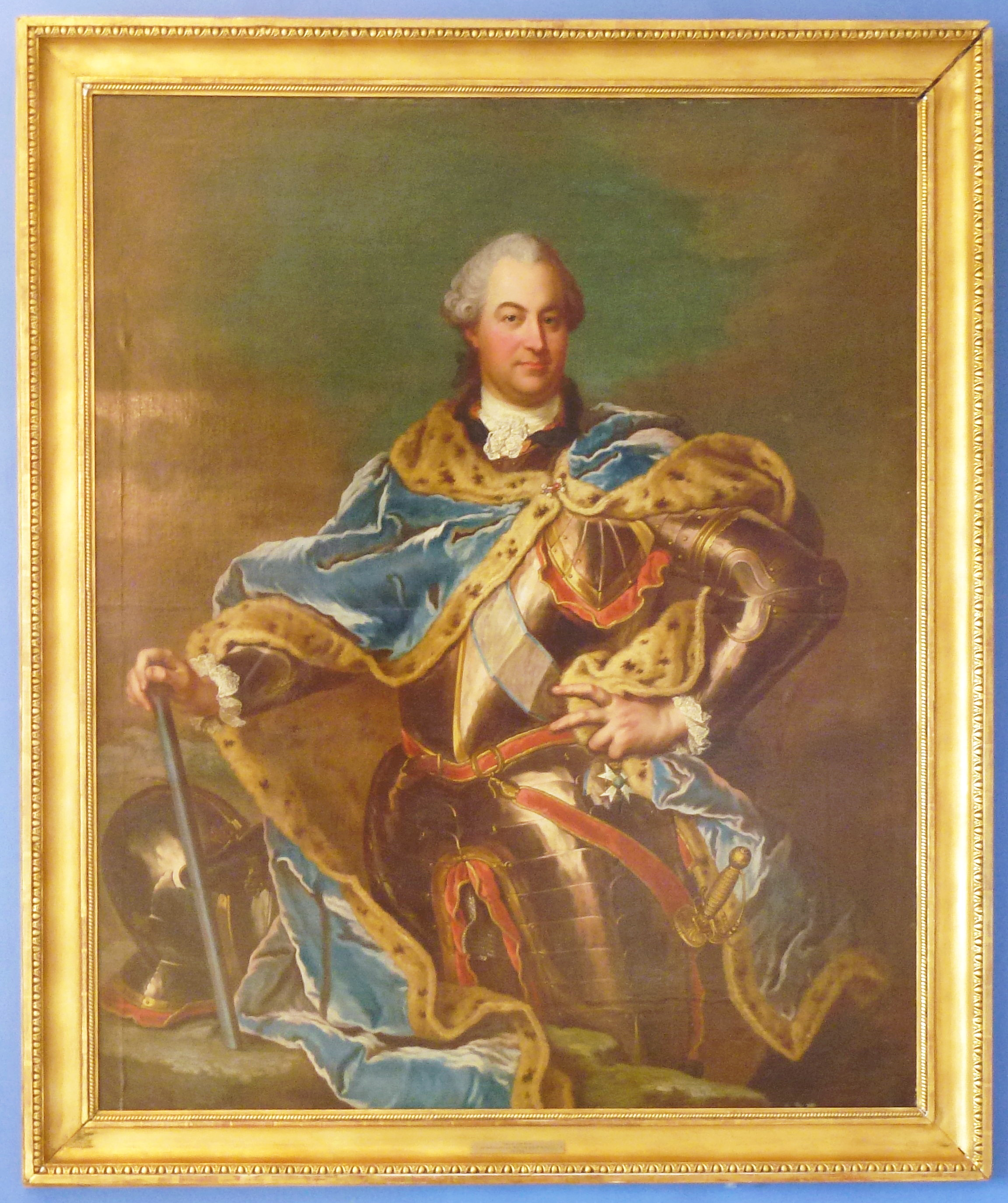 Ture Gustaf Rudbeck, 1714-1786, målning tillskriven Jacob Björck